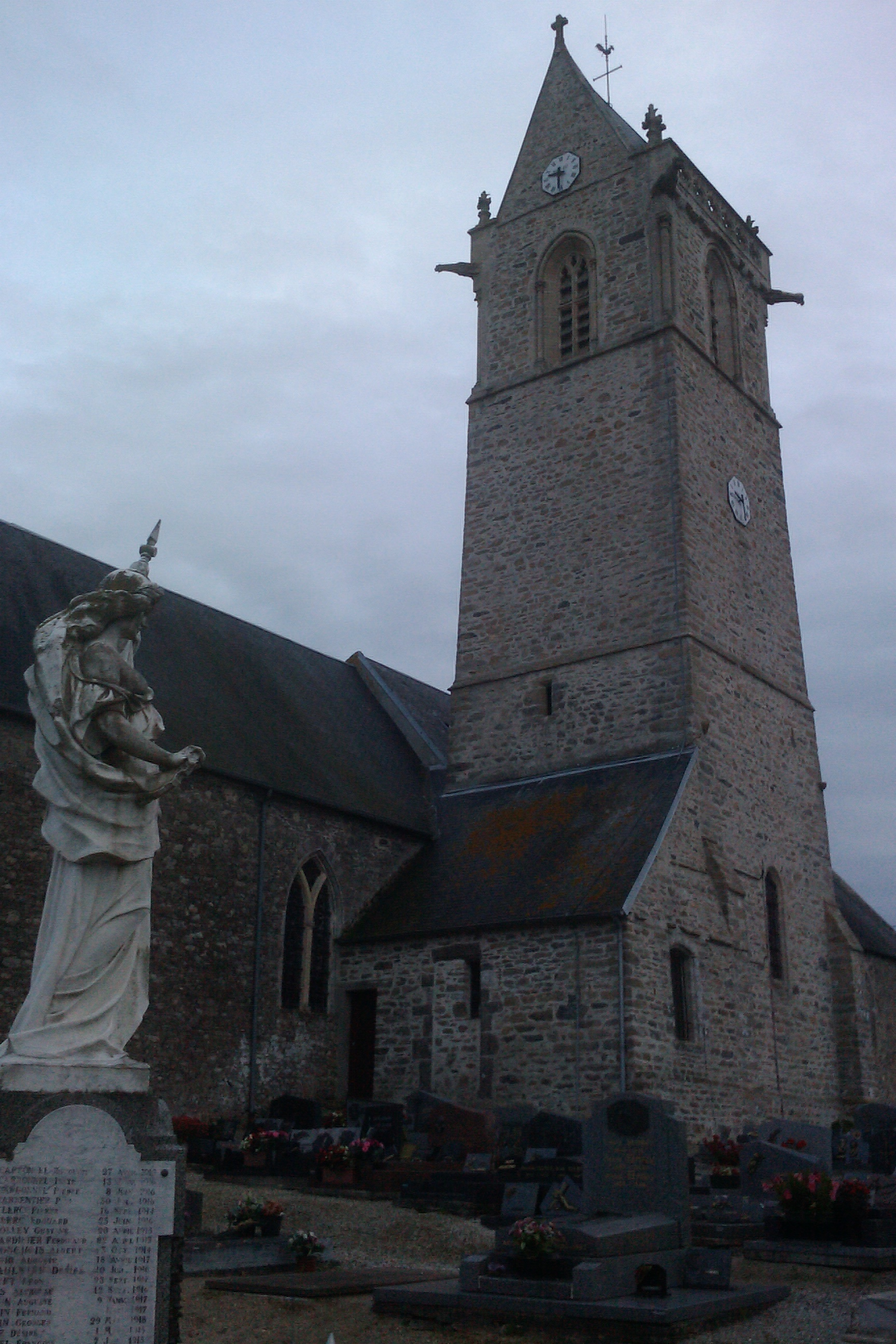 Église d'Hauteville-la-Guichar